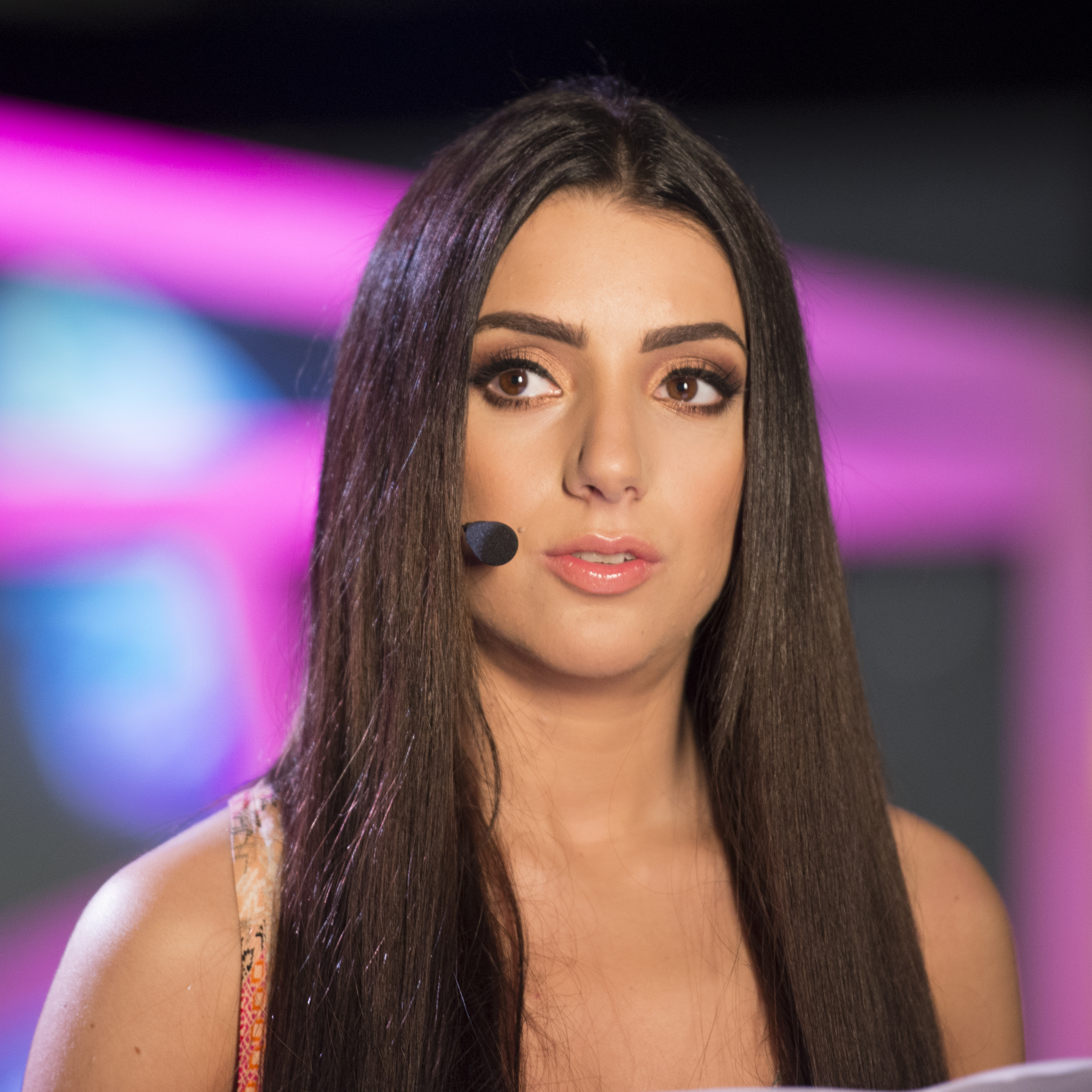 Gina Dirawi påar SVT-programmet Studio Eurovision inne i Malmömässan.